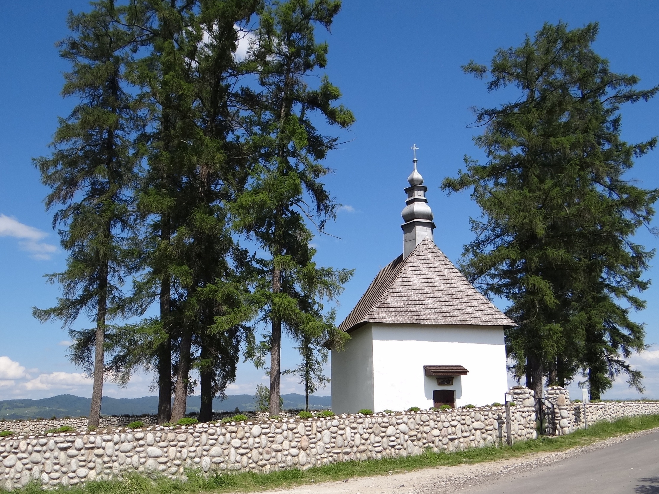 Kościółek św. Magdaleny